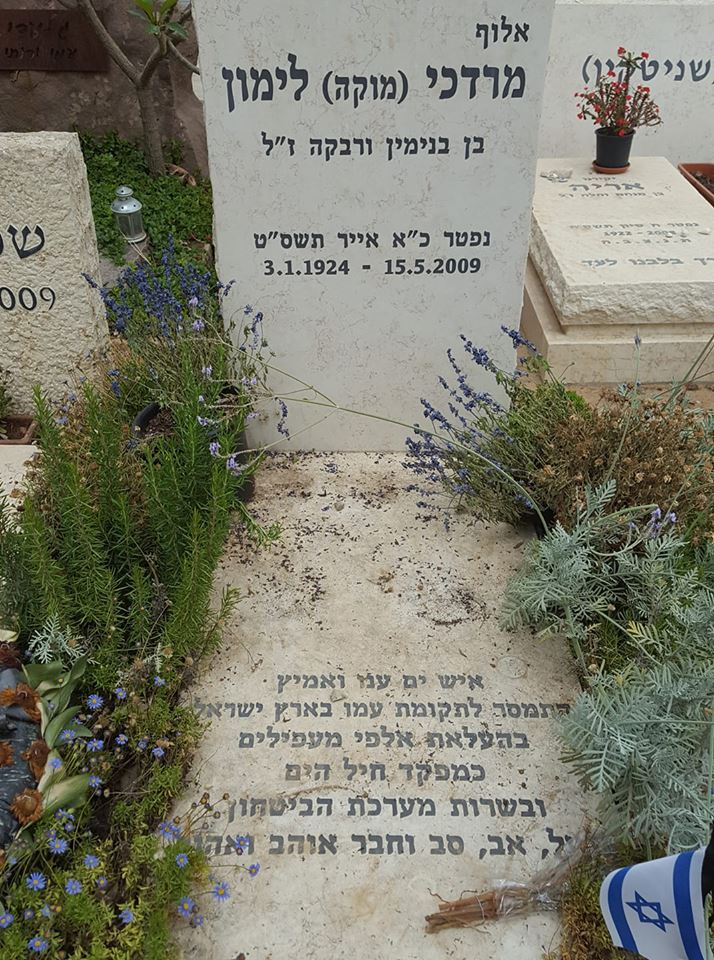 מצבת קברו של האלוף מרדכי (מוקה) לימון בכפר שמריהו צילום :אלי אלון